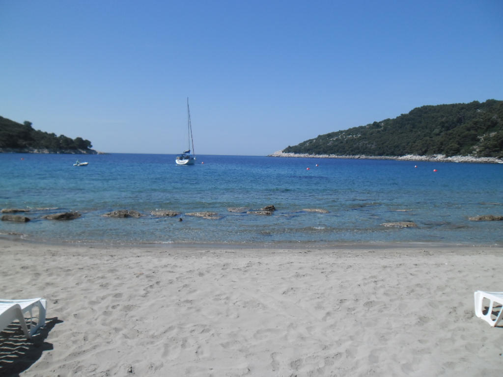 značajni krajobraz Saplunara, otok Mljet